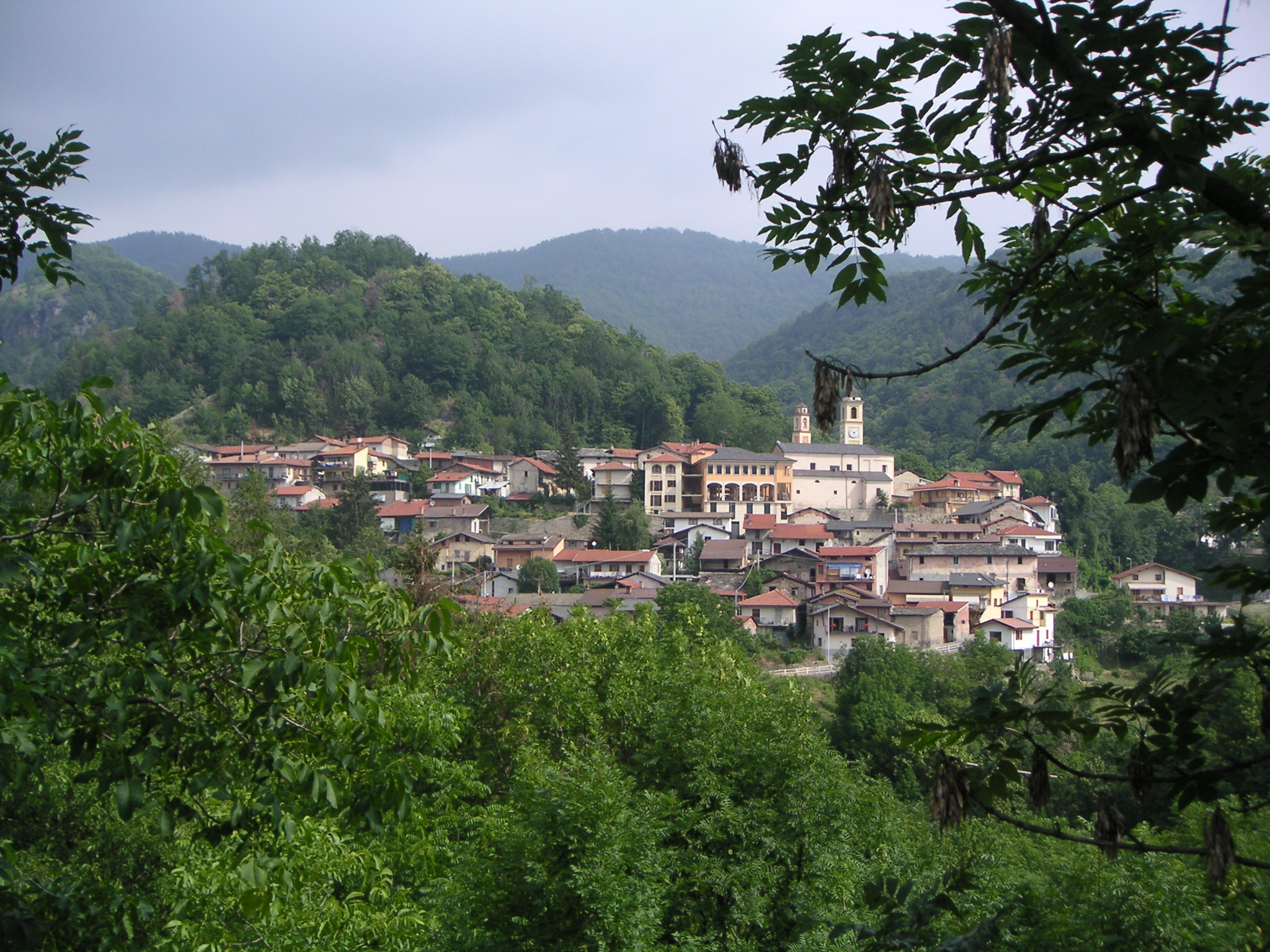 Vue générale de la commune de Roccaspavera-Italie-Région du Piémont-Province de Coni